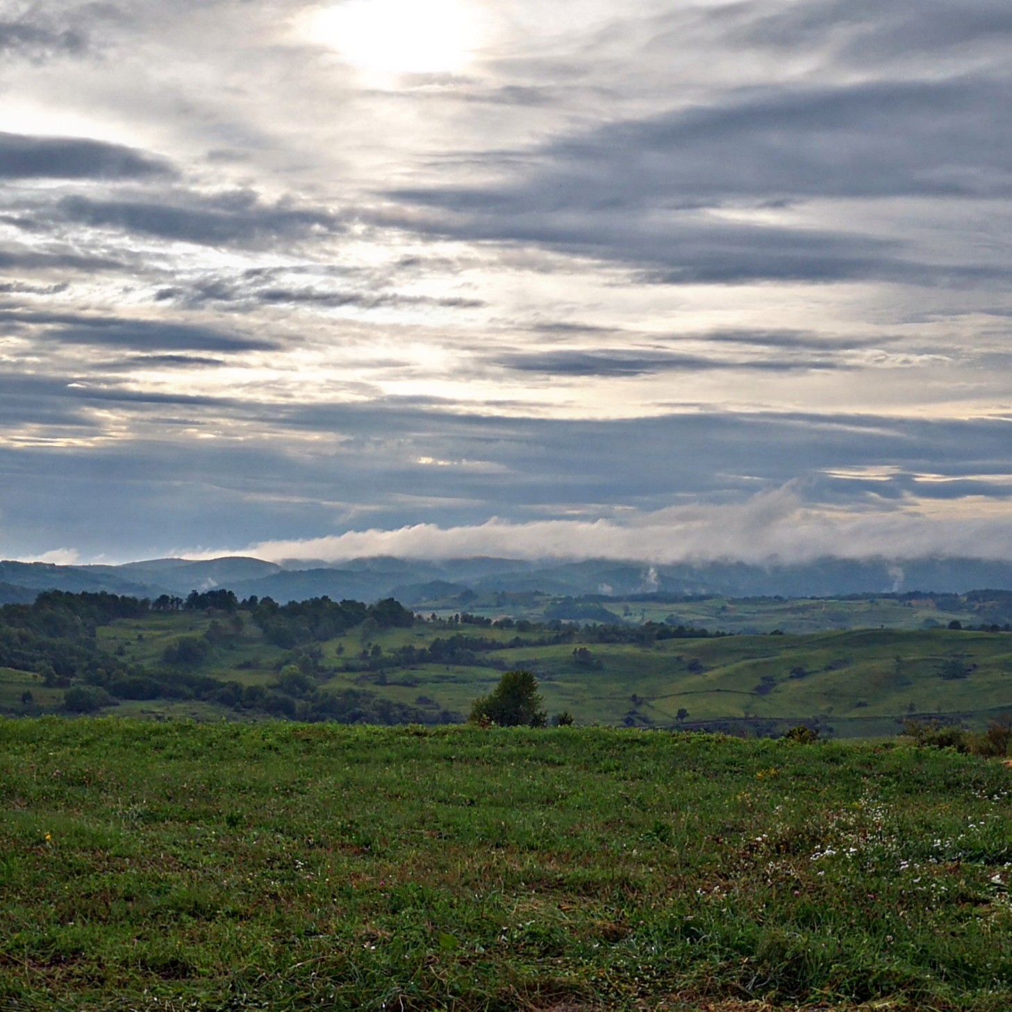 Zrinska gora